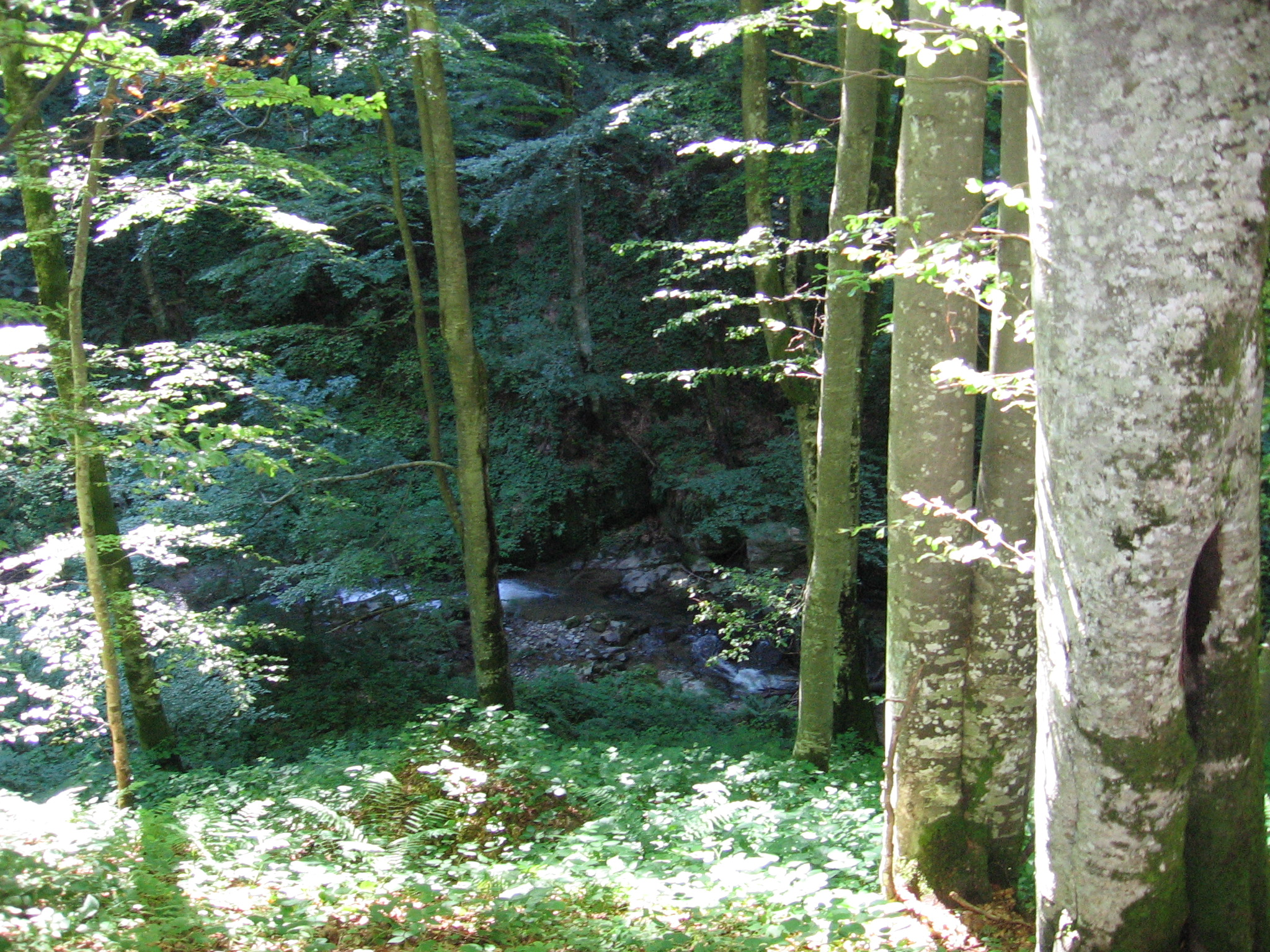 Golema reka ispod Rudarskog rida, leti.